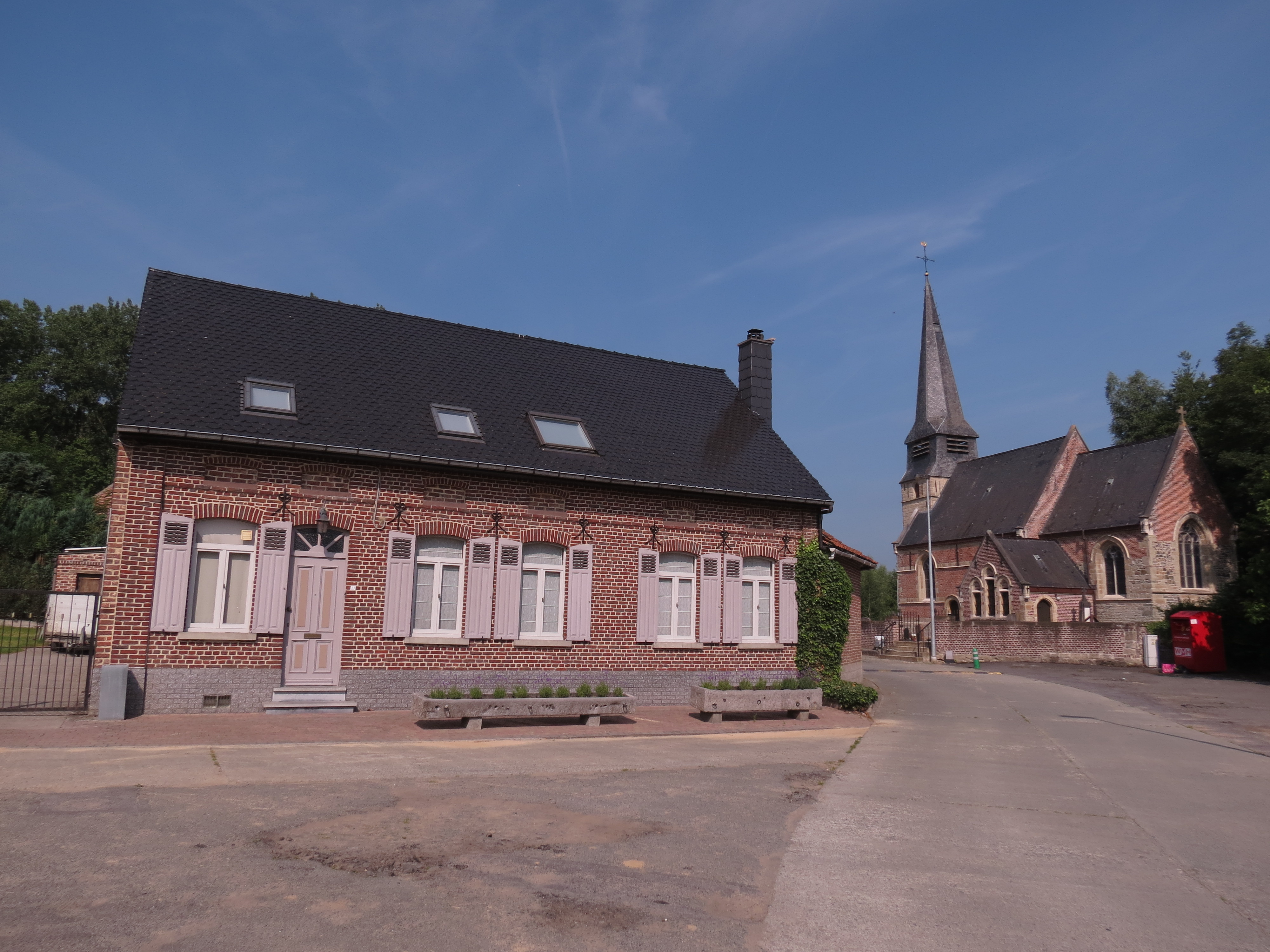 Geraardsbergen - Smeerebbe-Vloerzegem - Vloerzegemstraat 27 This photo of immovable heritage has been taken in the Flemish Region